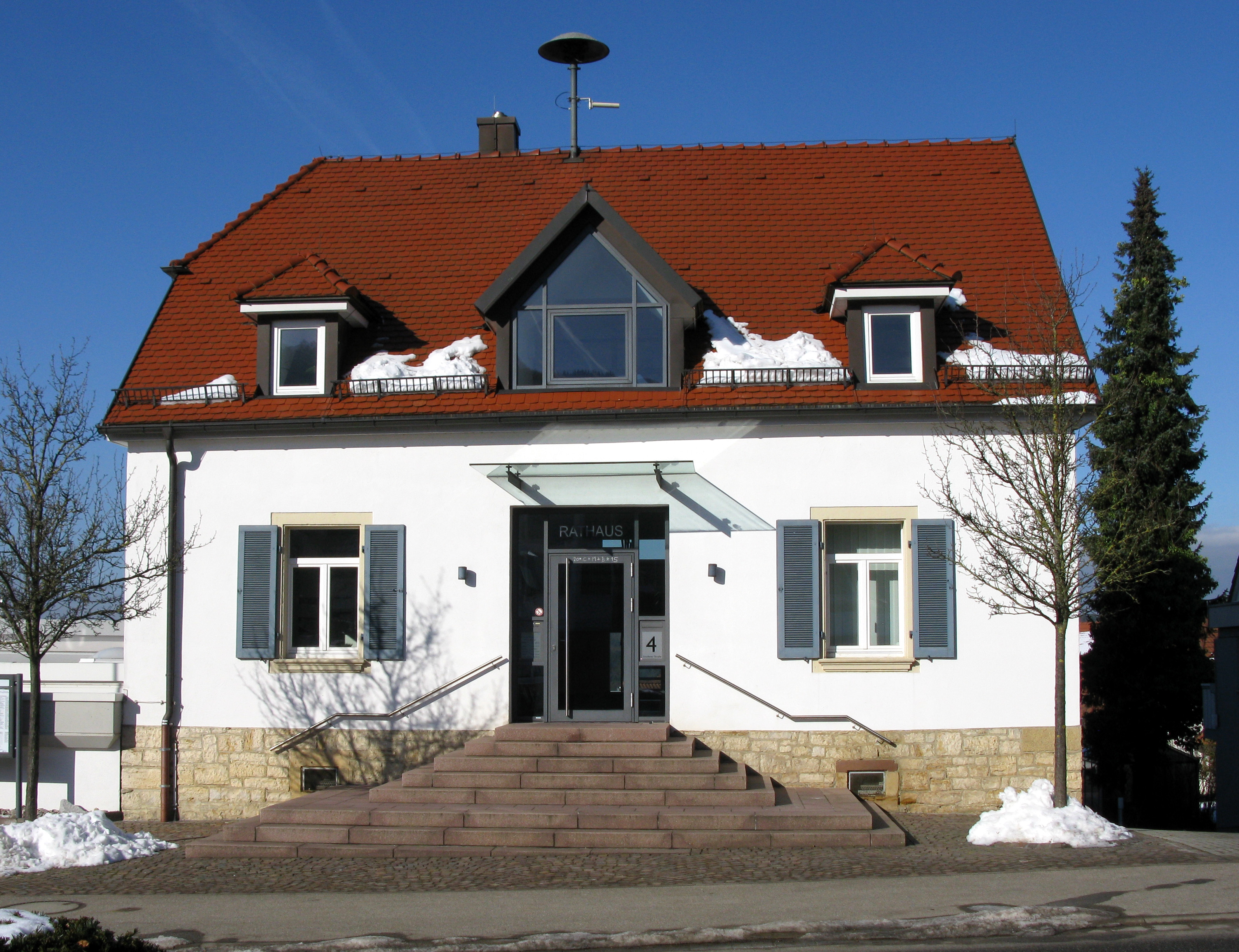 Rathaus von Sölden im Schwarzwald